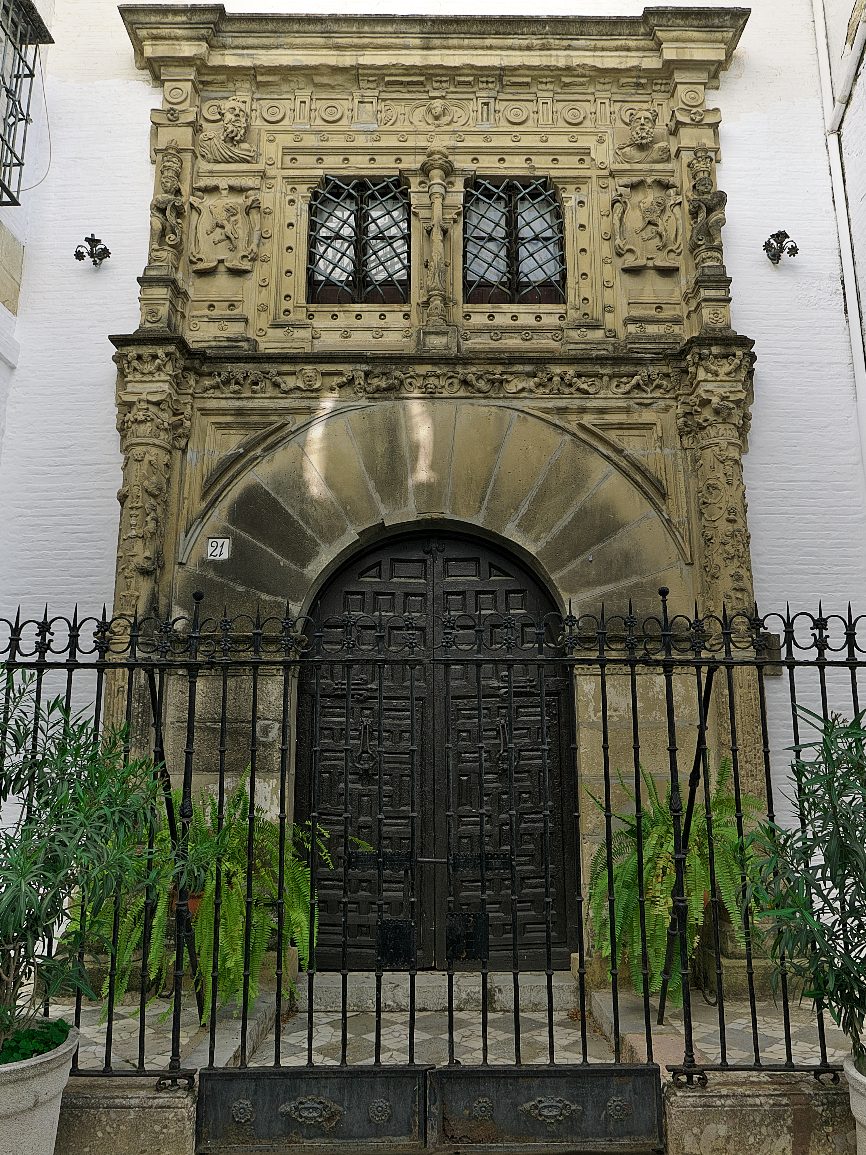 Portada de la casa de Pickman, Barrio de Santa Cruz (Sevilla). Procedente de la casa de Pedro de Aranda (Úbeda).